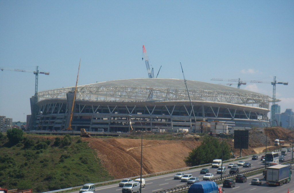 Türk Telekom Arena